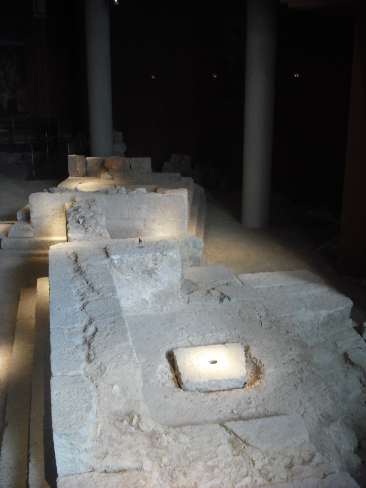 Vista general dels Mausoleus romans de Llíria.